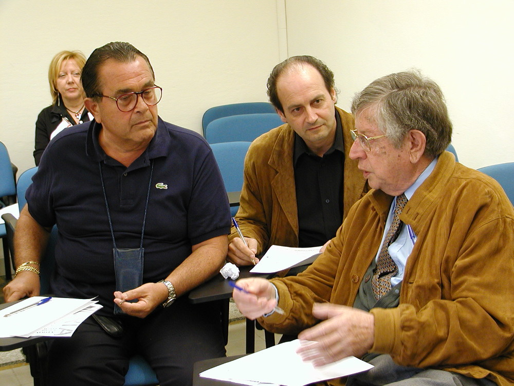 Un momento della riunione della giuria a Visionaria 2002